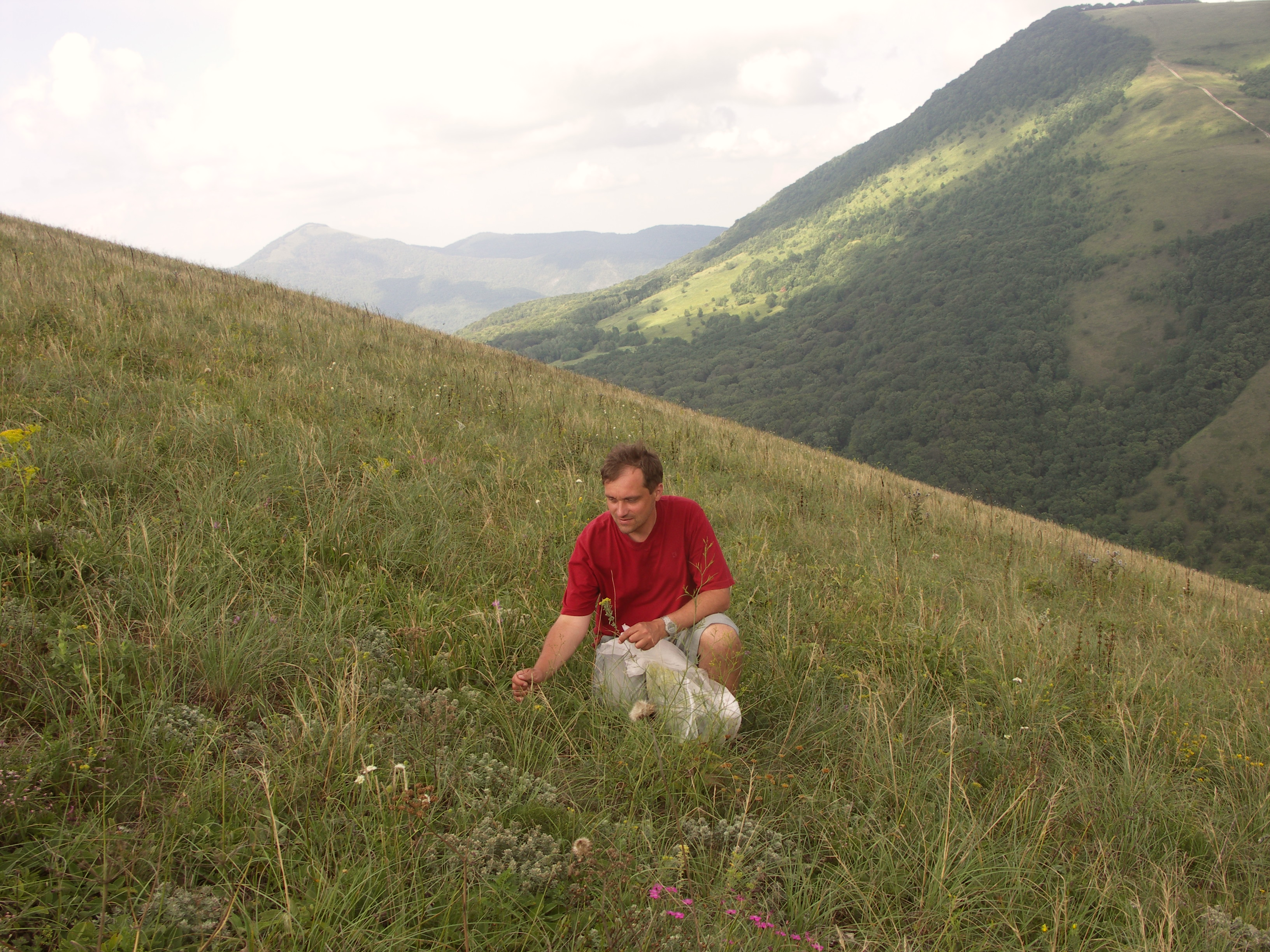 Roman Pavela - sběr rostlin na Kavkaze.